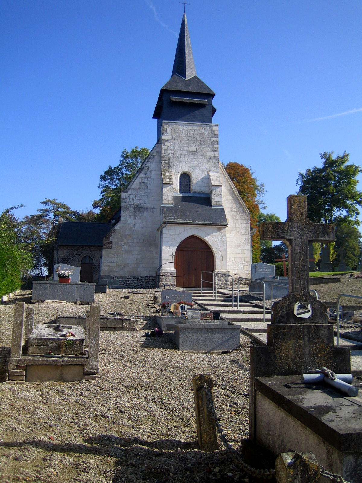 Soues (Somme, France)